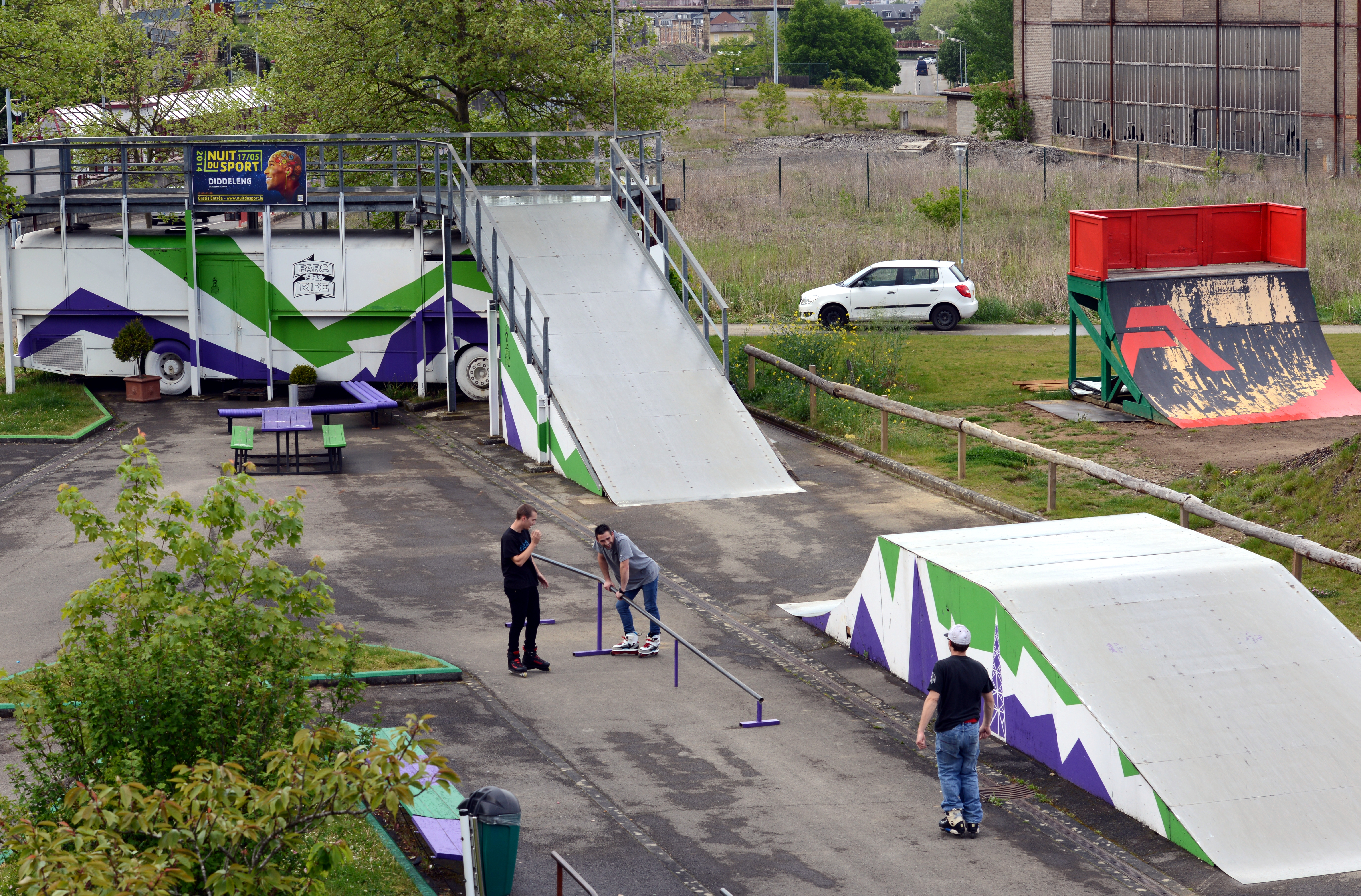 Um SkatePark Parc and Ride "Schmelz" am Quartier 'Op der Schmelz' zu Diddeleng.